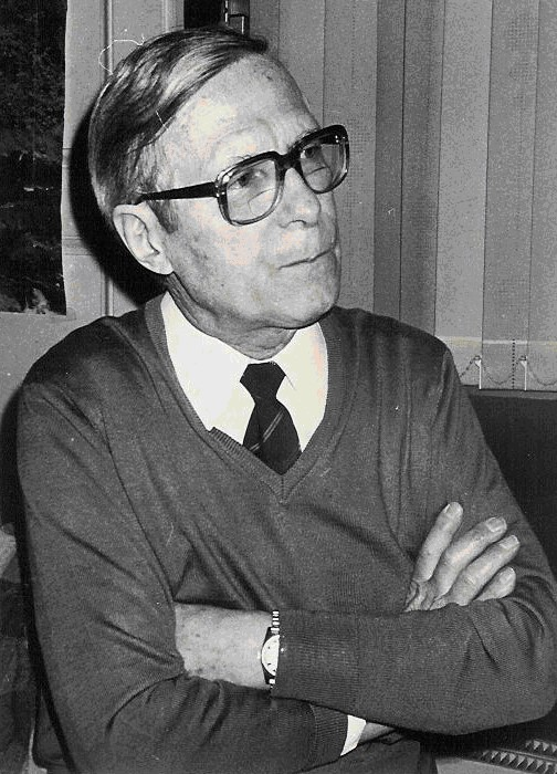 photo de Pierre Widmer en 1980